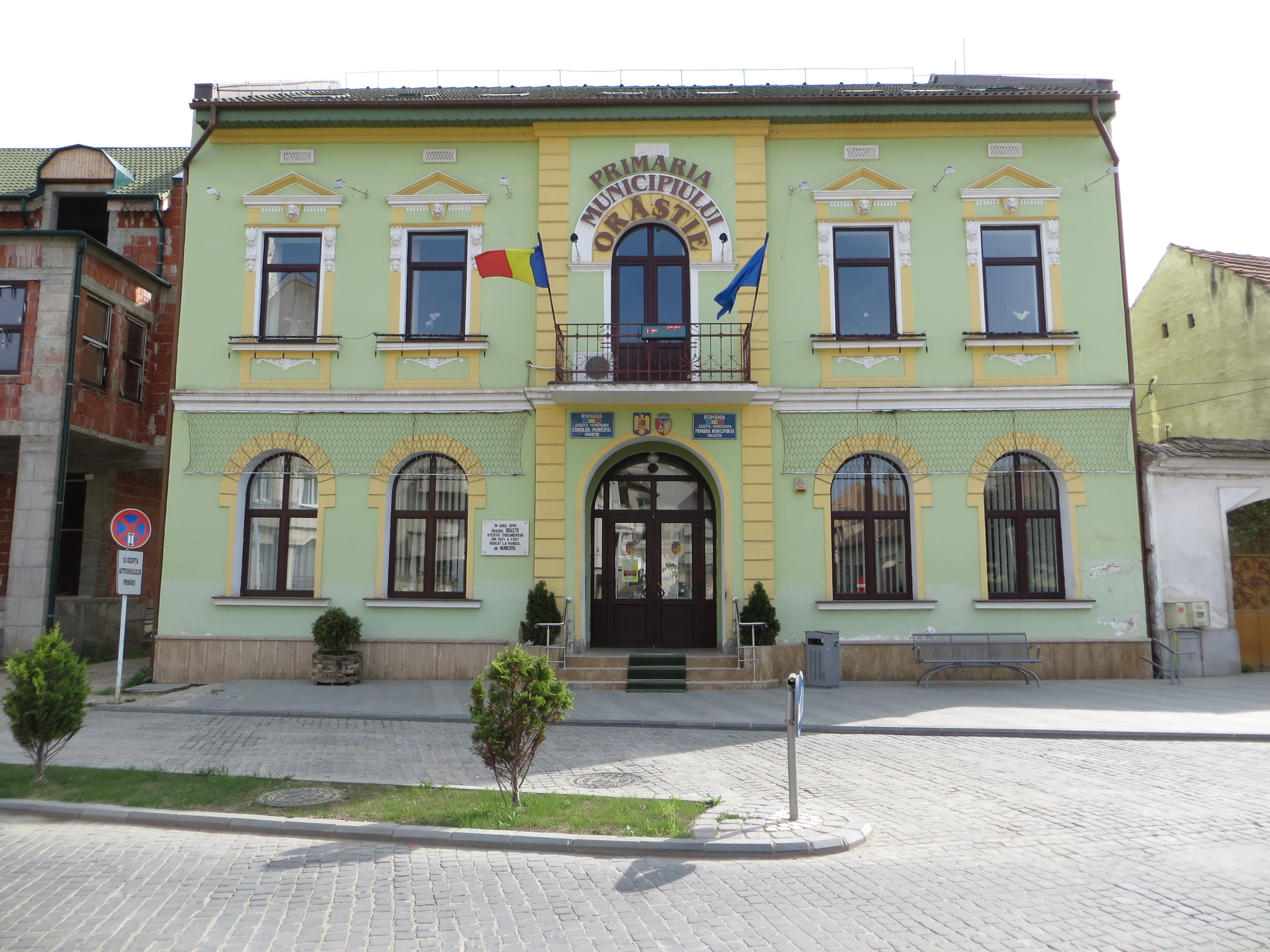 Centrul istoric al orașului